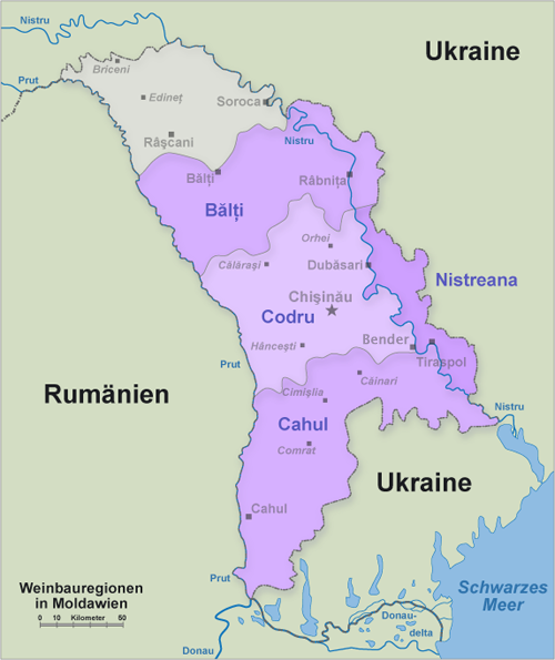 die vier Weinregionen in Moldawien selbstgezeichnet von Perconte, Lizenz